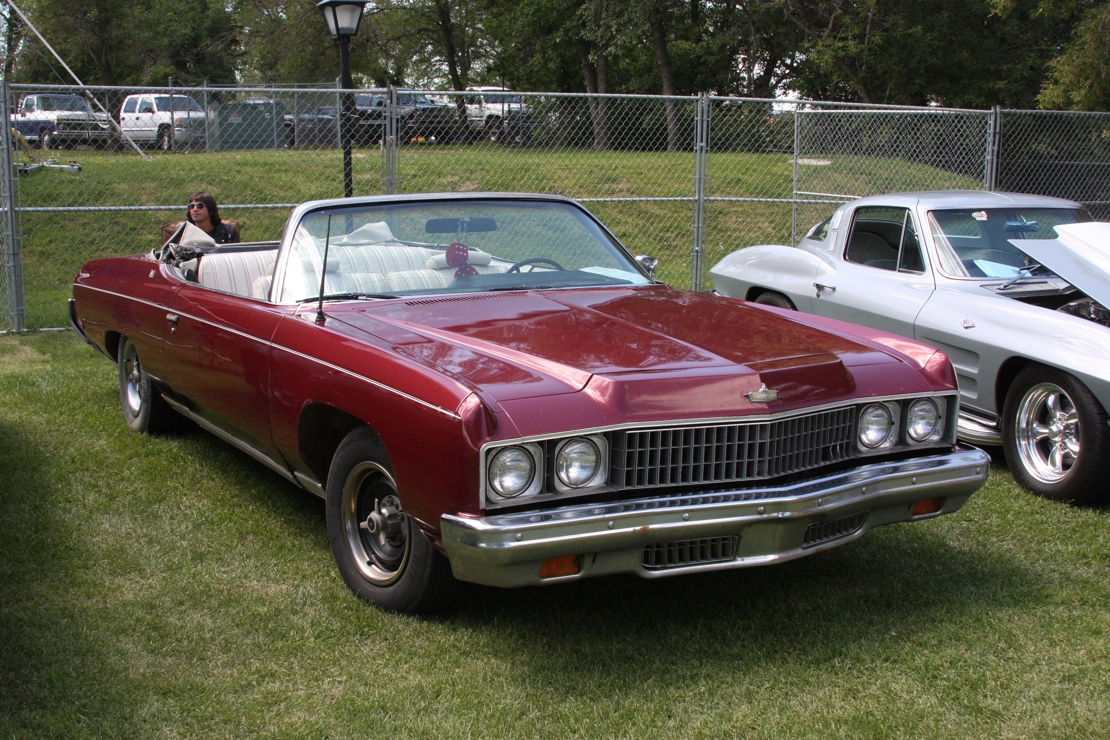 1973 Chevrolet Convertible